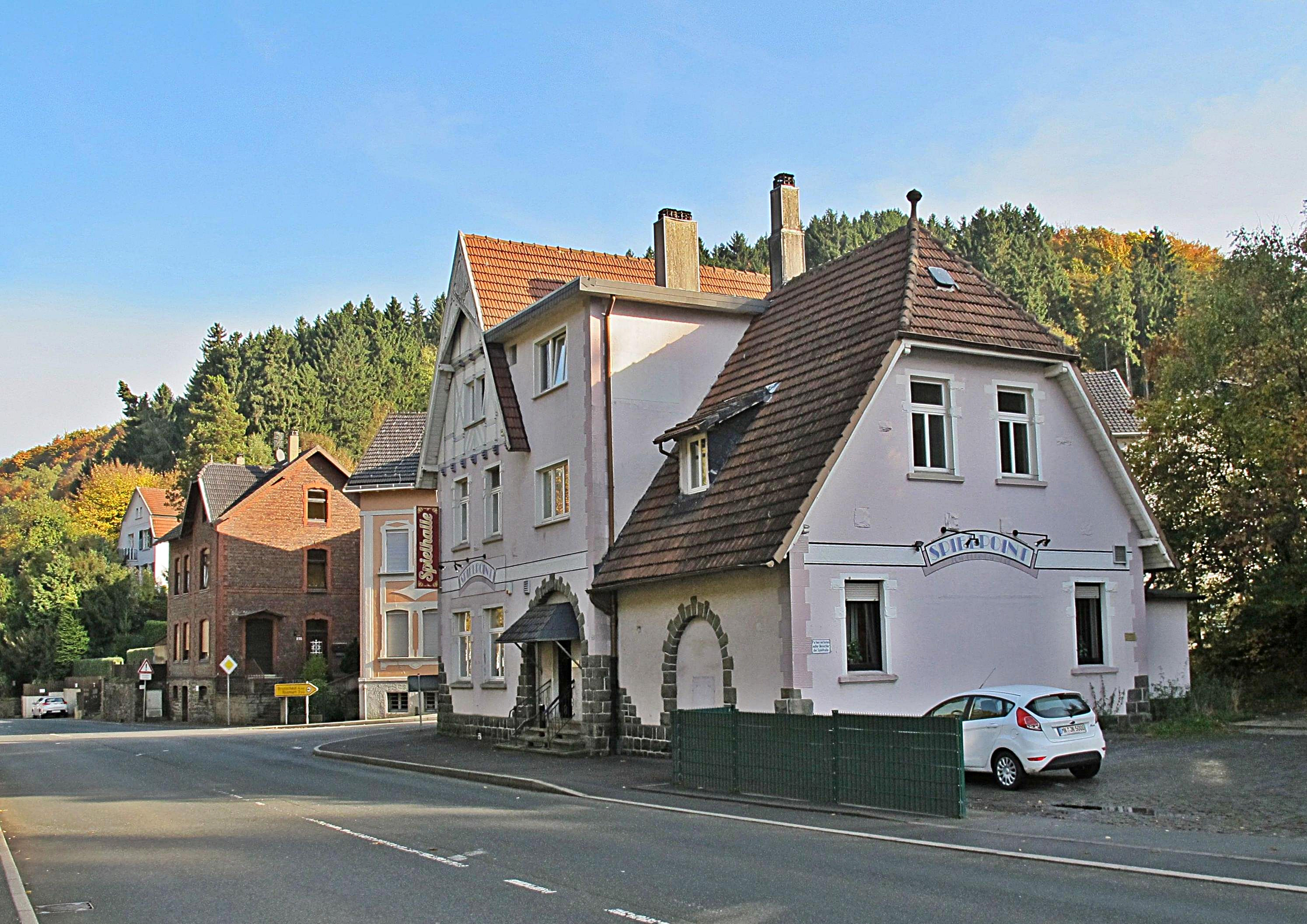 Ehem.Bhf. d. Kreis Altenaer Eisenbahn, Märk.Kreis, NRW